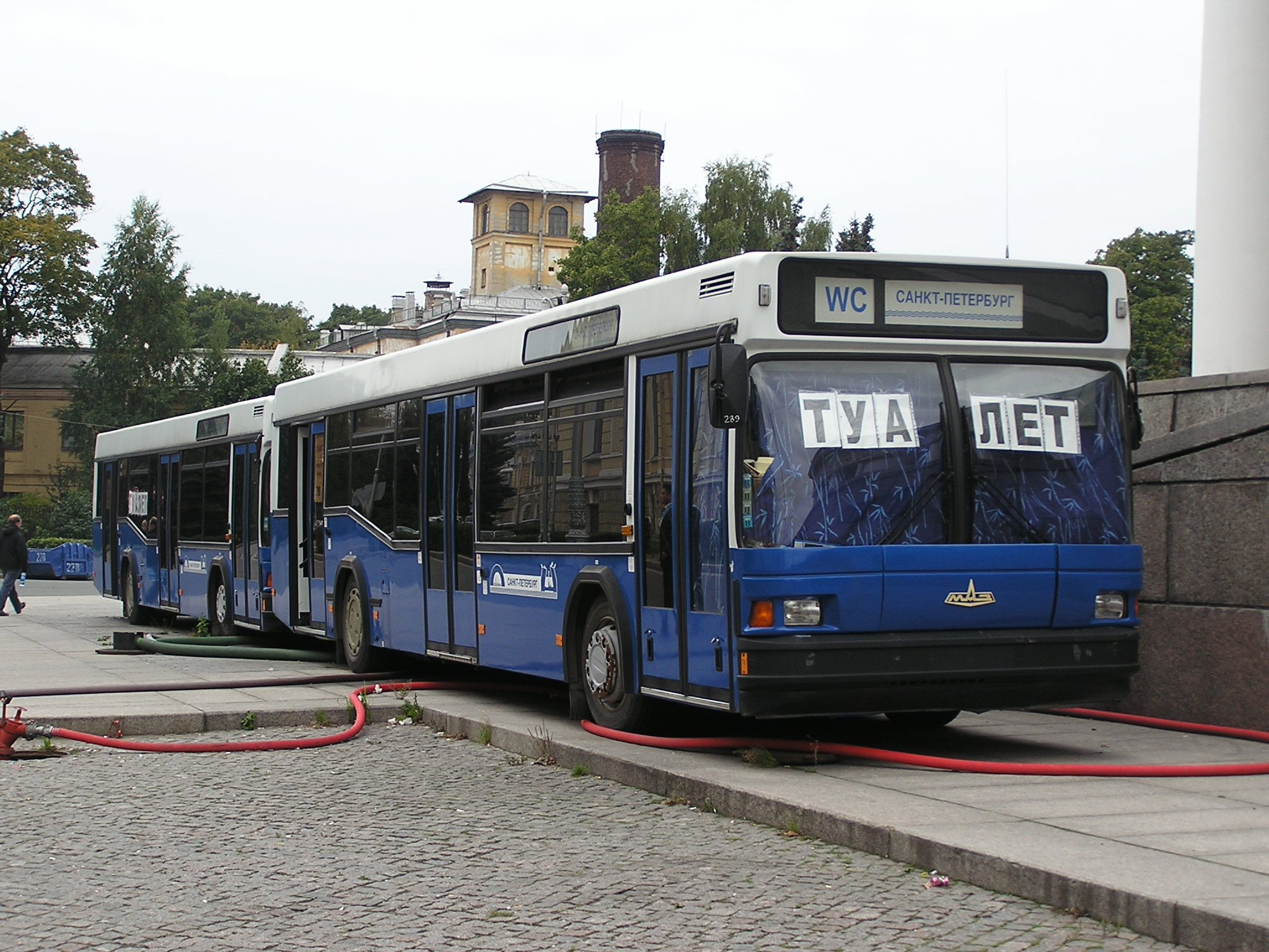 Автобус-туалет в Санкт-Петербурге